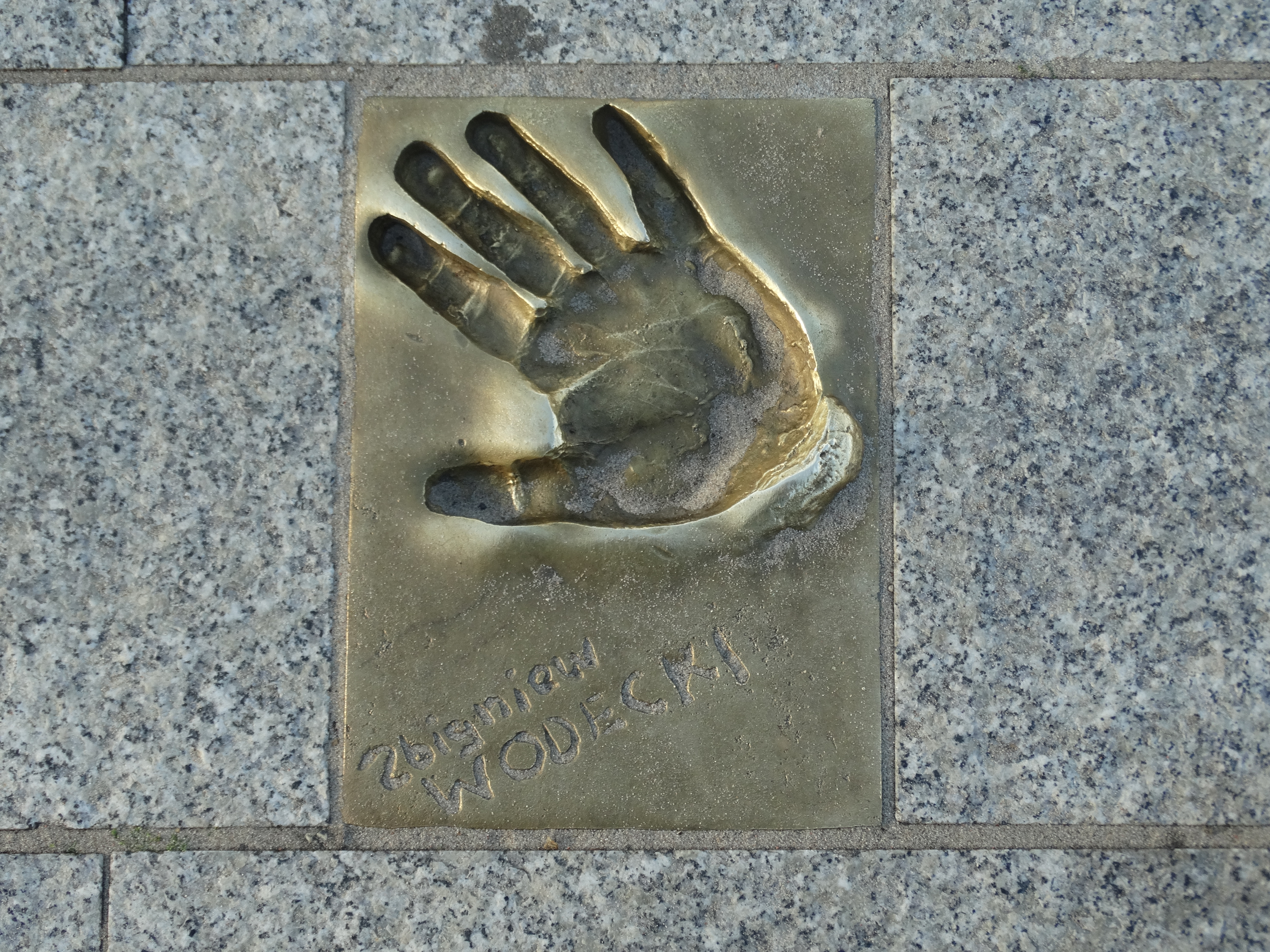 Międzyzdroje, Aleja Gwiazd - Zbigniew Wodecki